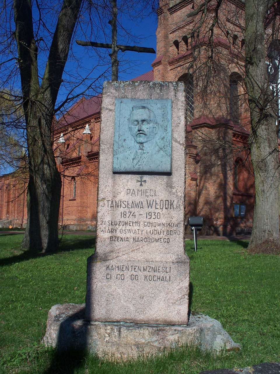 Pomnik ten znajduje się na cmentarzu przykościelnym.